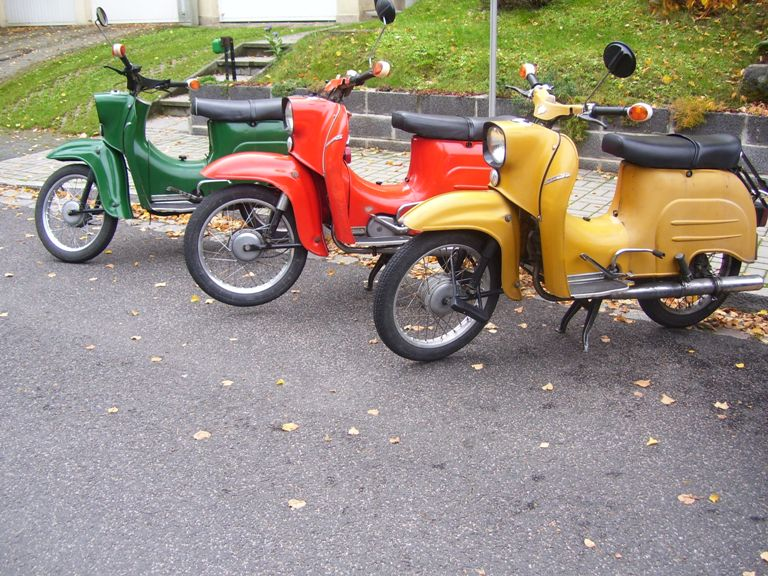 3 originale Varianten der Simson Schwalbe: Von links nach rechts: KR51/2 L Bj. 82, billardgrün; KR51/1 S Bj 79, rot, KR 51/1 K Bj 80, saharabraun